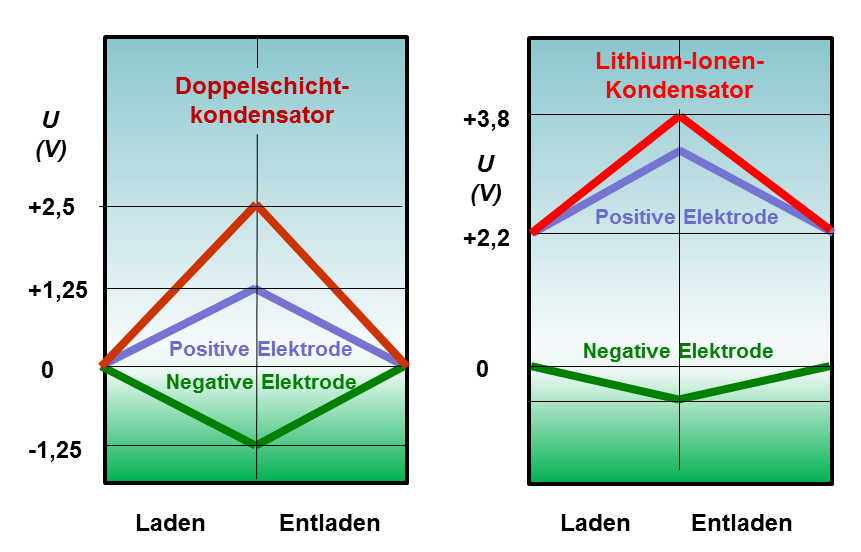 Spannungsverlauf in den Elektroden von Doppelschicht- und Lithium-Ionen-Kondensatoren sowie der daraus resultierende gesamte Spannungverlauf